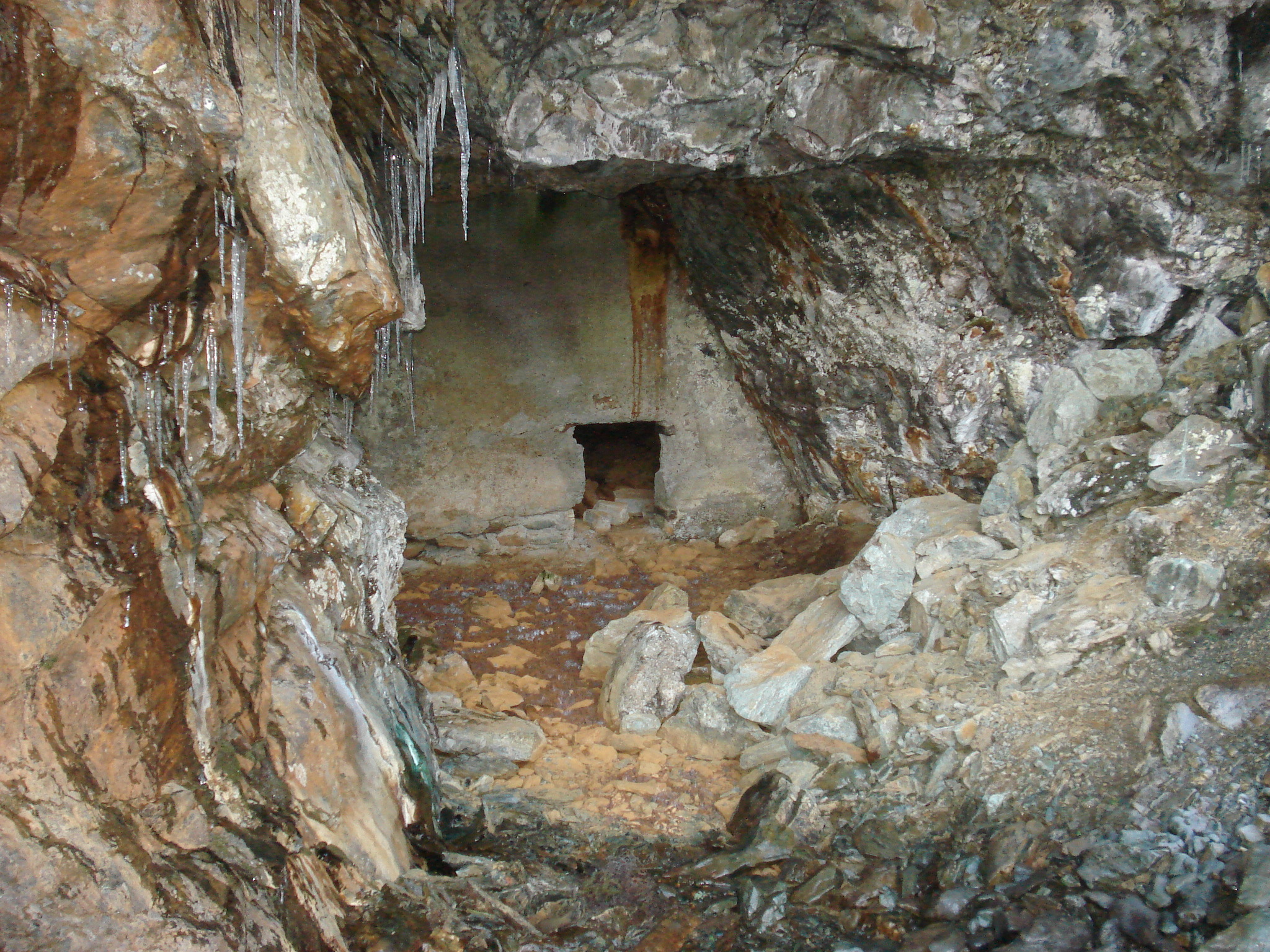 Gjenstøpt gruveinngang, Ulriksdal.